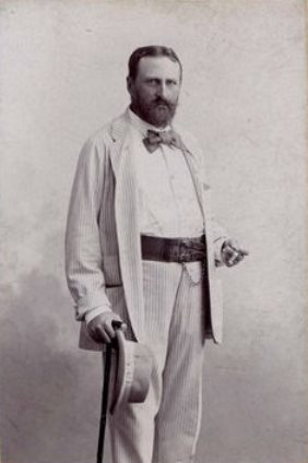 Keglevich István gróf (1840-1905), a Nemzeti Színház, az Operaház és a Vígszínház intendánsa kb. 55 éves korában.